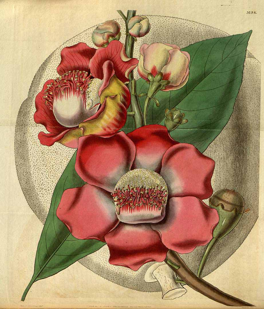 Коуропіта гаянська